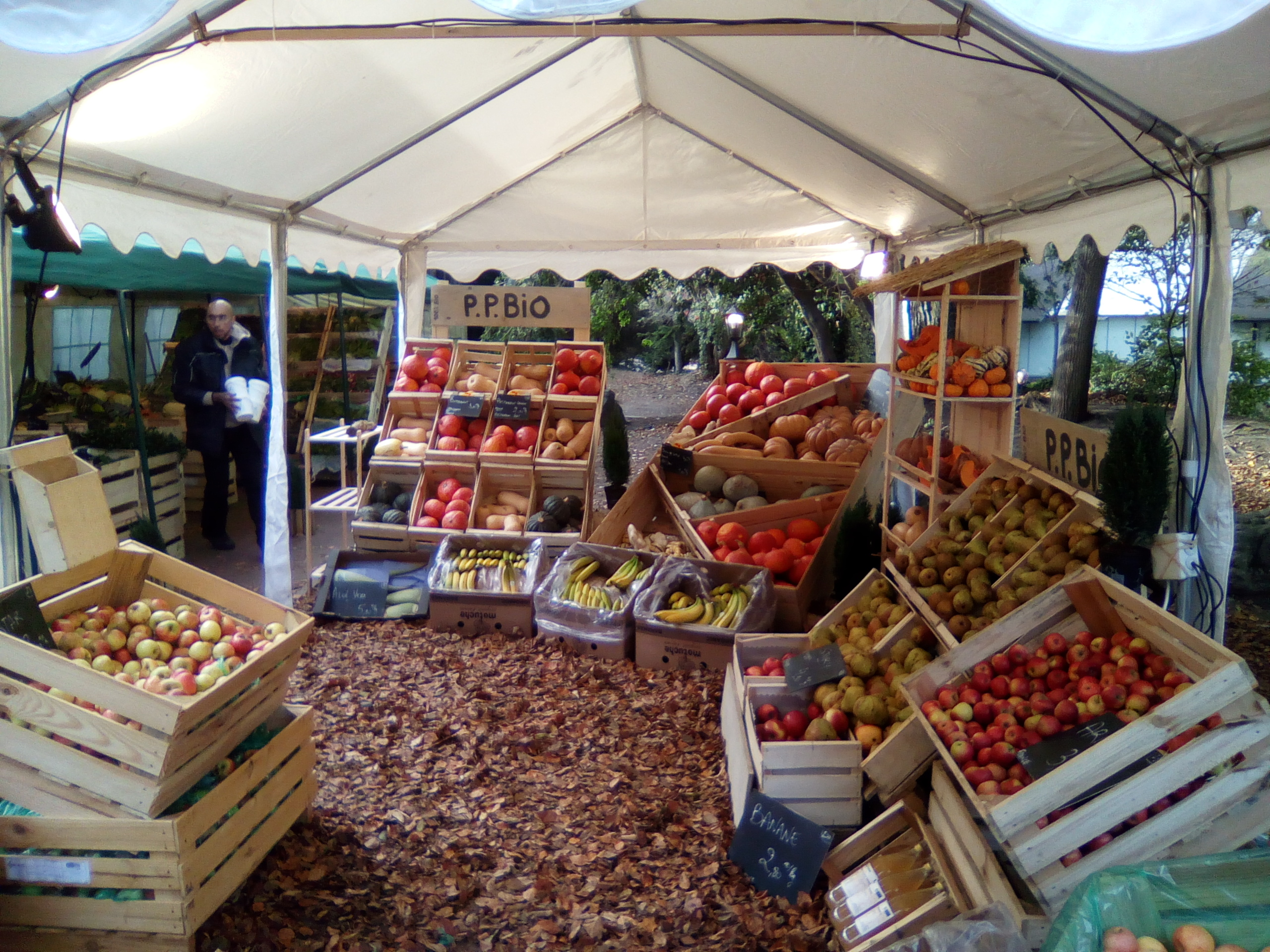 Salon Marjolaine.